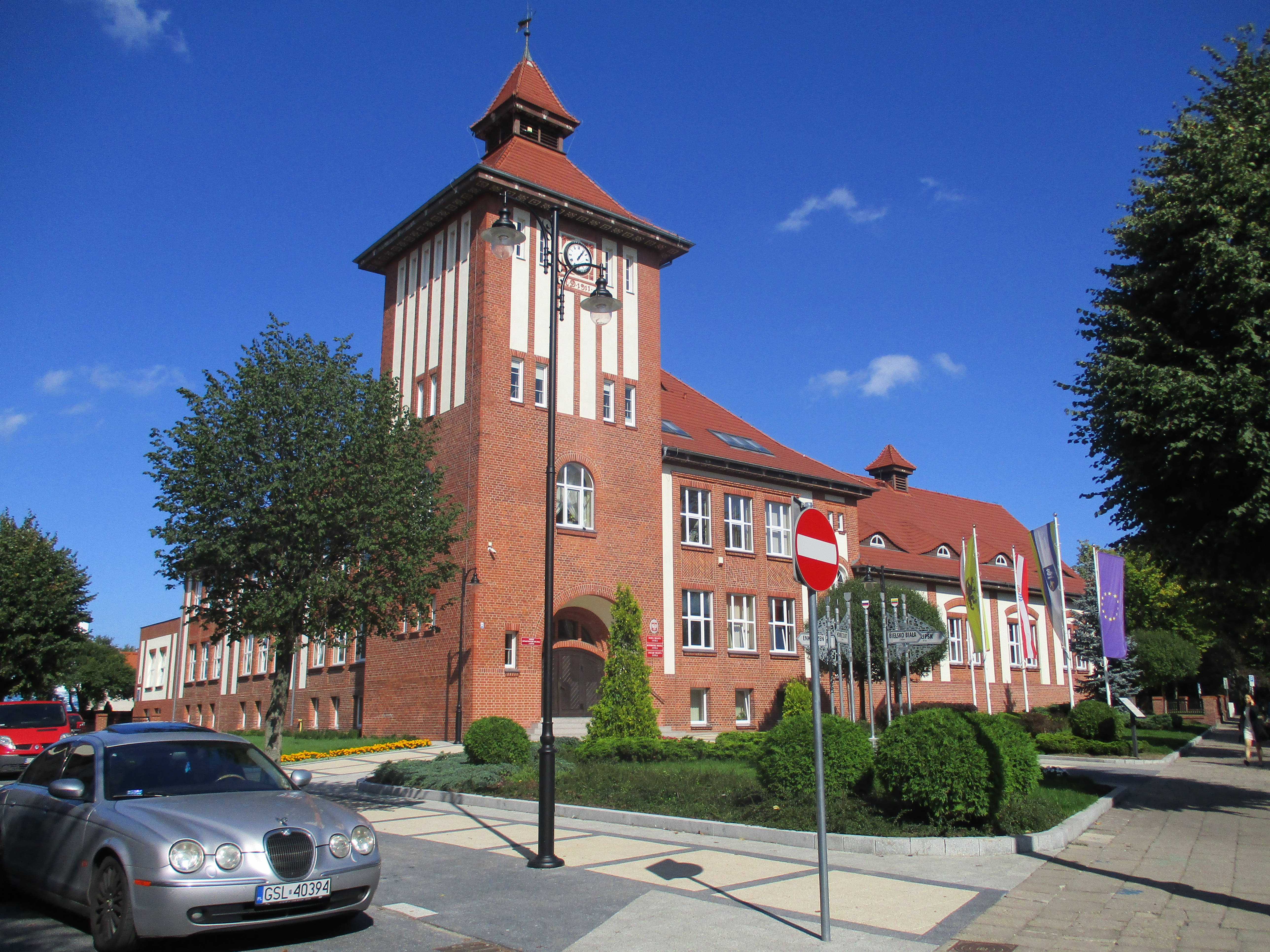 Ustka, ul. Kardynała Wyszyńskiego 3 - pierwotnie szkoła, obecnie ratusz 1911